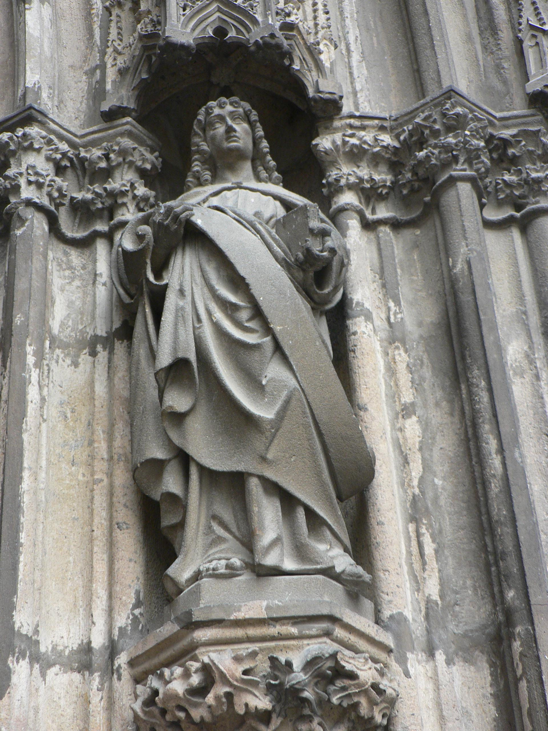 Mátyás király a garamszentbenedeki bazilika főkapuján (Szlovákia)